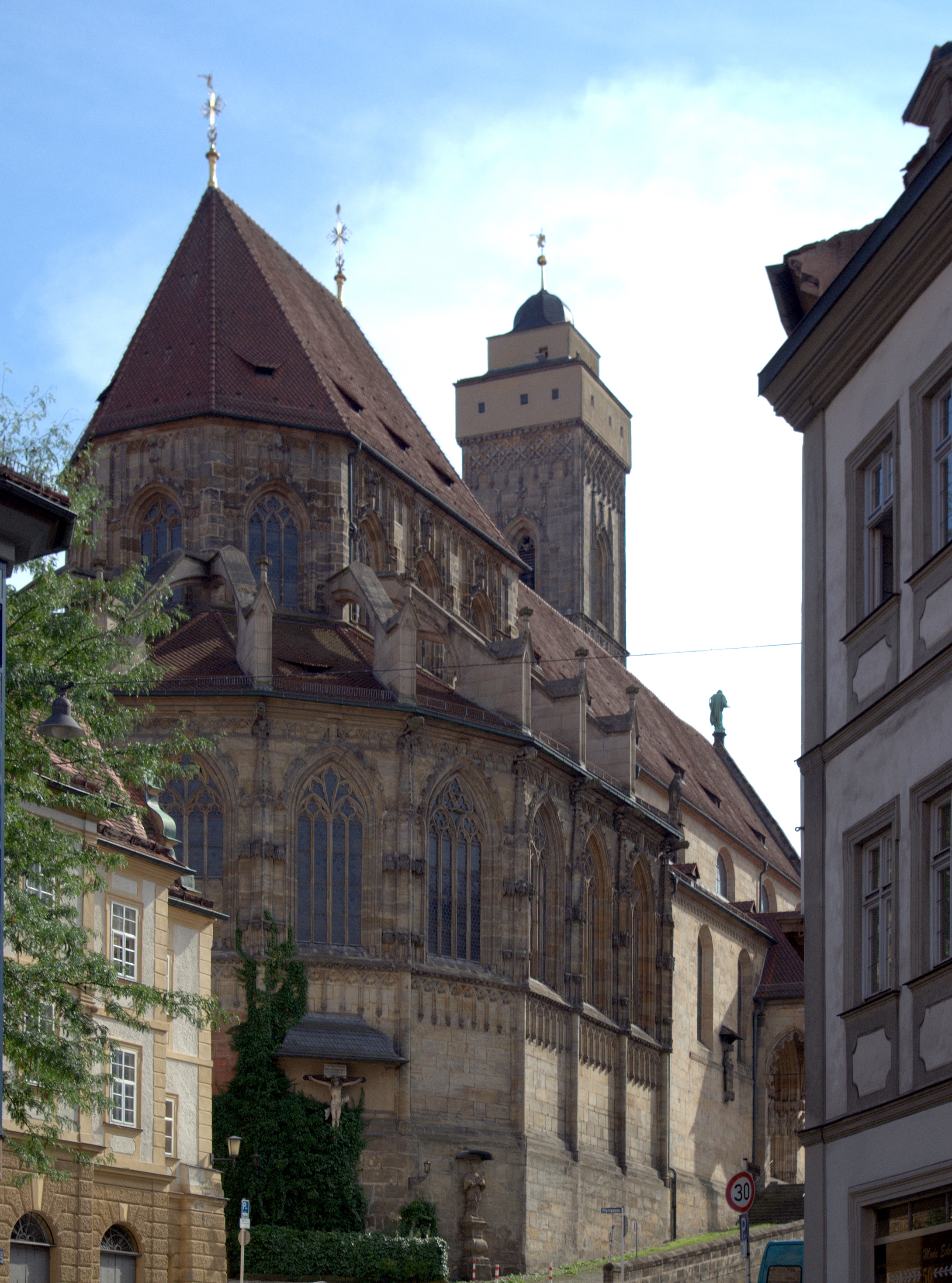 Bamberg, Obere Pfarre aus Nordost